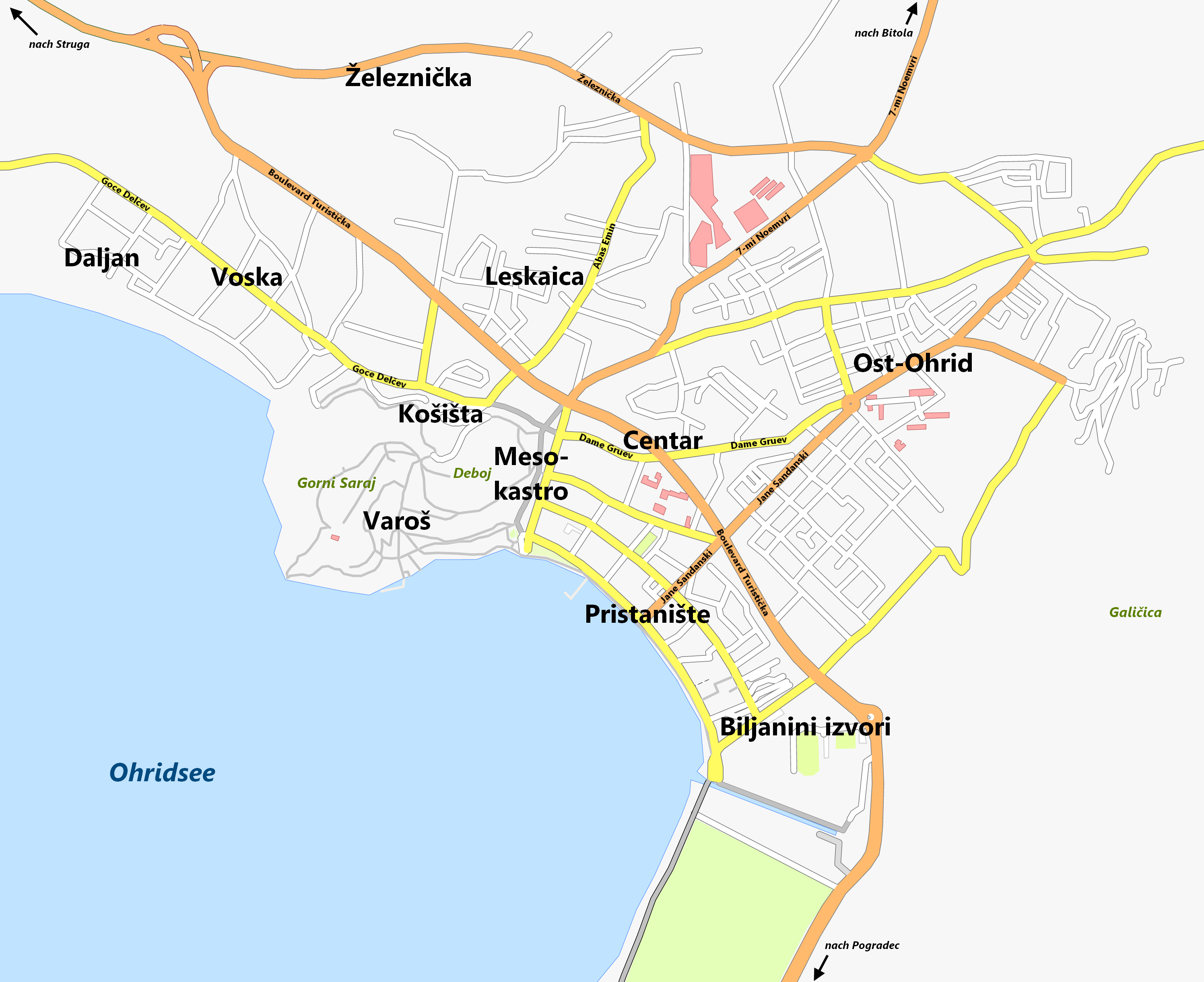 mit Benennung der wichtigsten Quartiere, Hauptstrassen, Erhebungen und fortführender Strassenverbindungen in jeweilige Städte Farbenbedeutung: orange - vierspurige Hauptstraße, gelb - zweispurige Hauptstraße, weiss - Nebenstraße, grau - Fußgängerzone, rosa - Industriegebäude und Krankenhäuser, grün - Grünanlage, blau - Gewässer